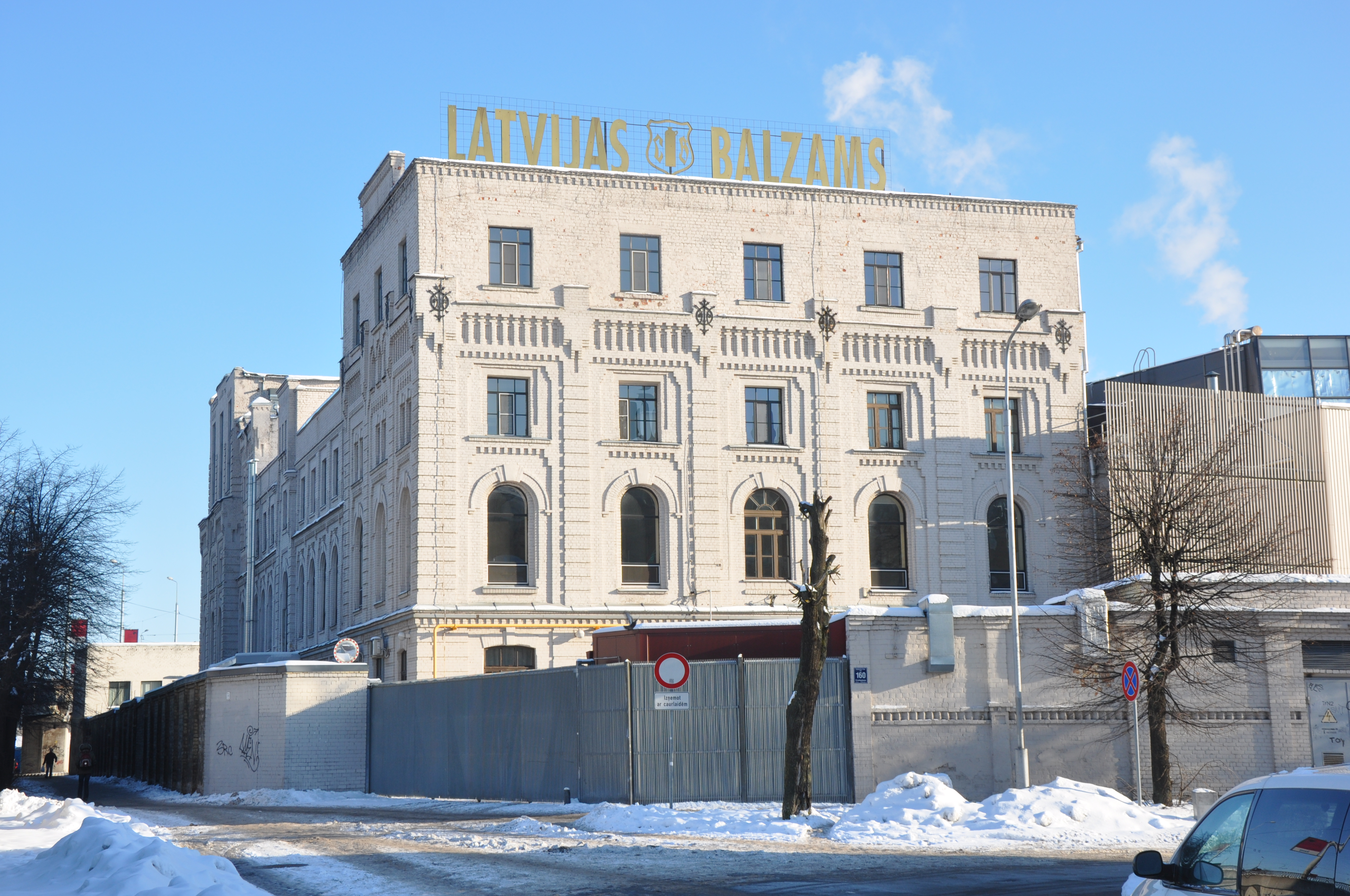 Latvijas balzams, Aleksandra Čaka iela 160, Rīga, Latvia